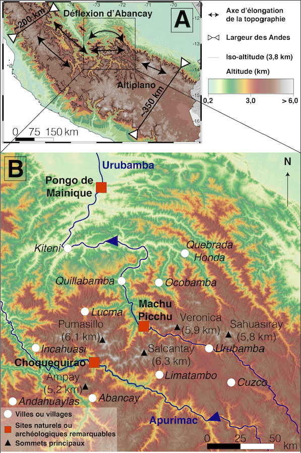 Localisation, toponymie et géographie de la Déflexion d’Abancay